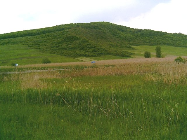 Tájkép Pókán (Erdély)